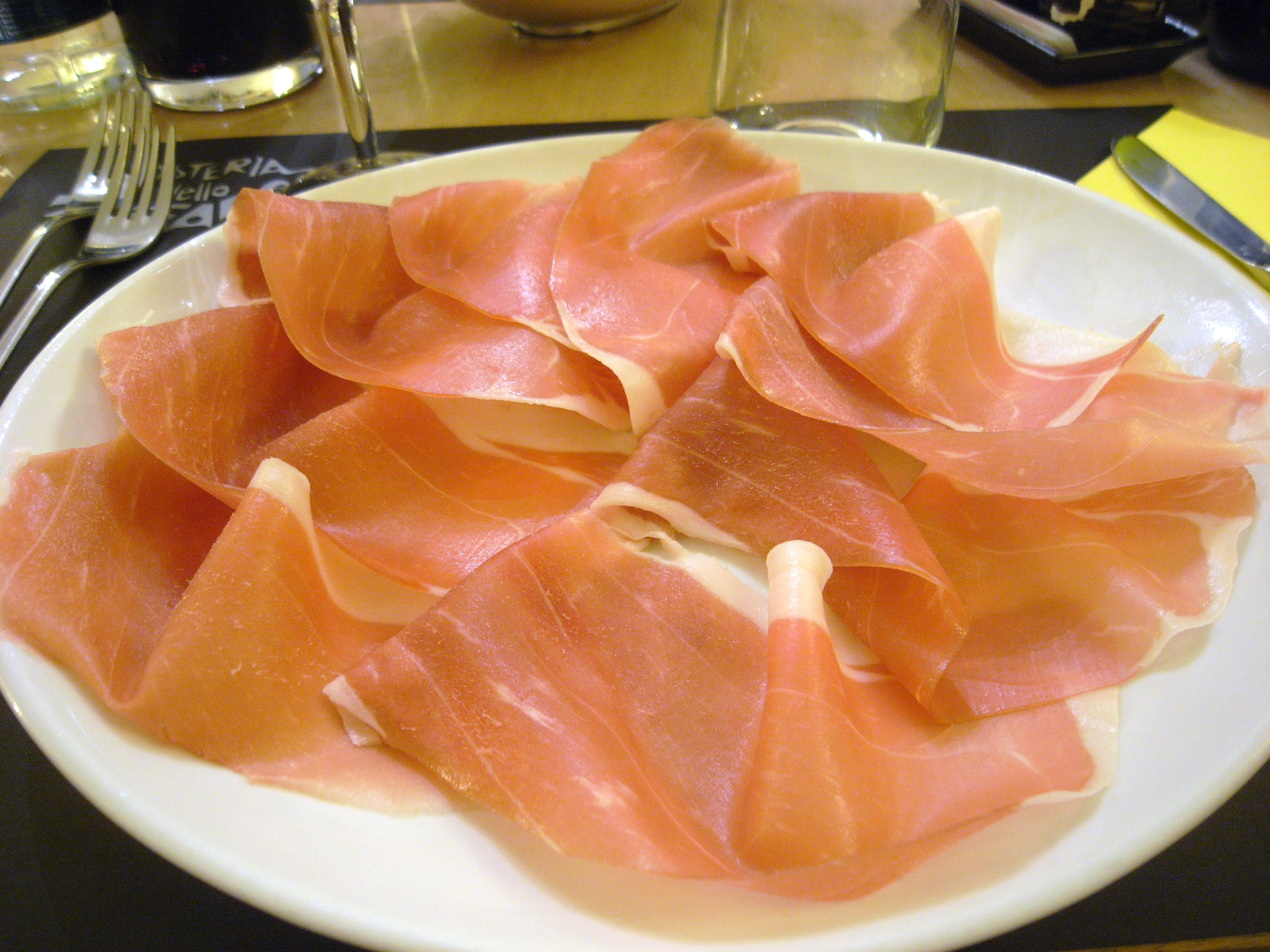 Prosciutto di Parma affettato